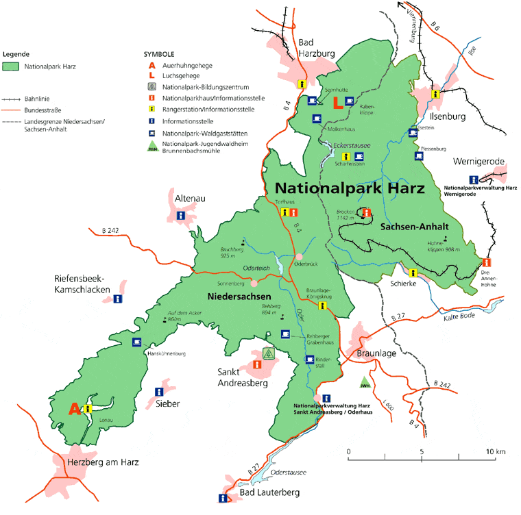 Karte des Nationalpark Harz